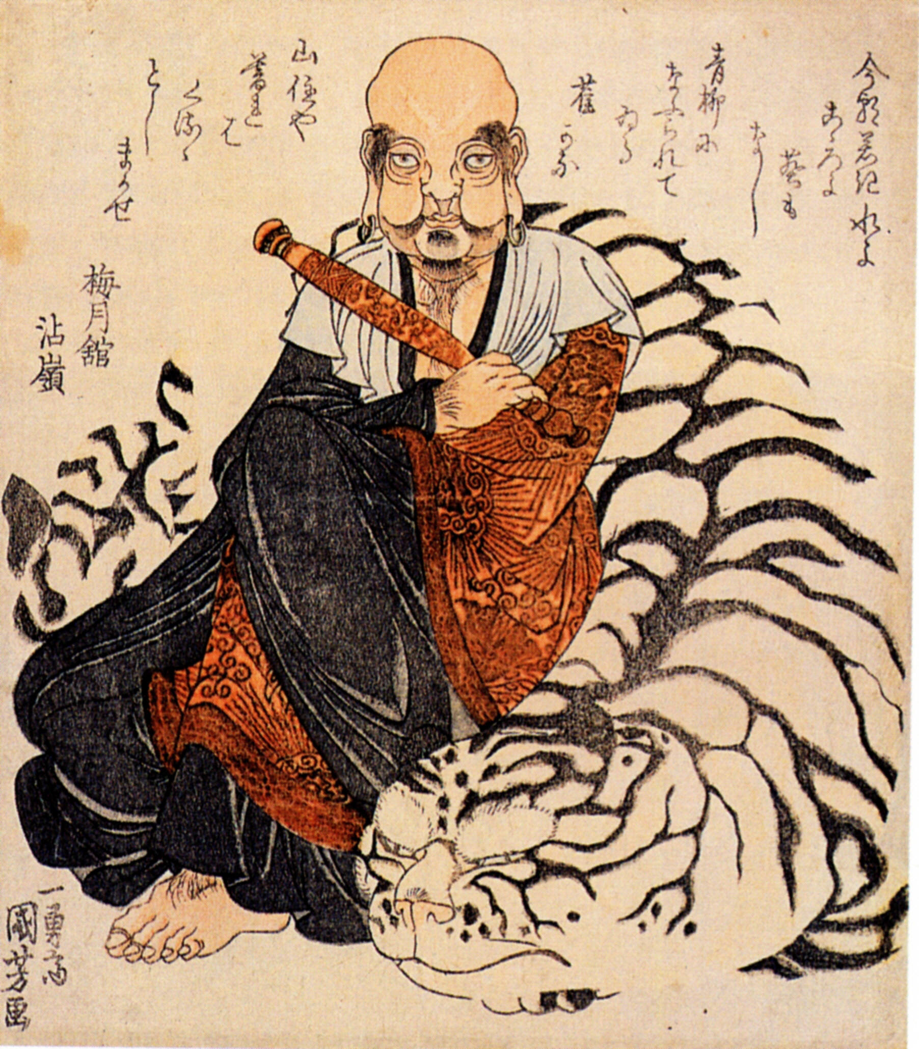 「鉢多羅尊者と白虎」